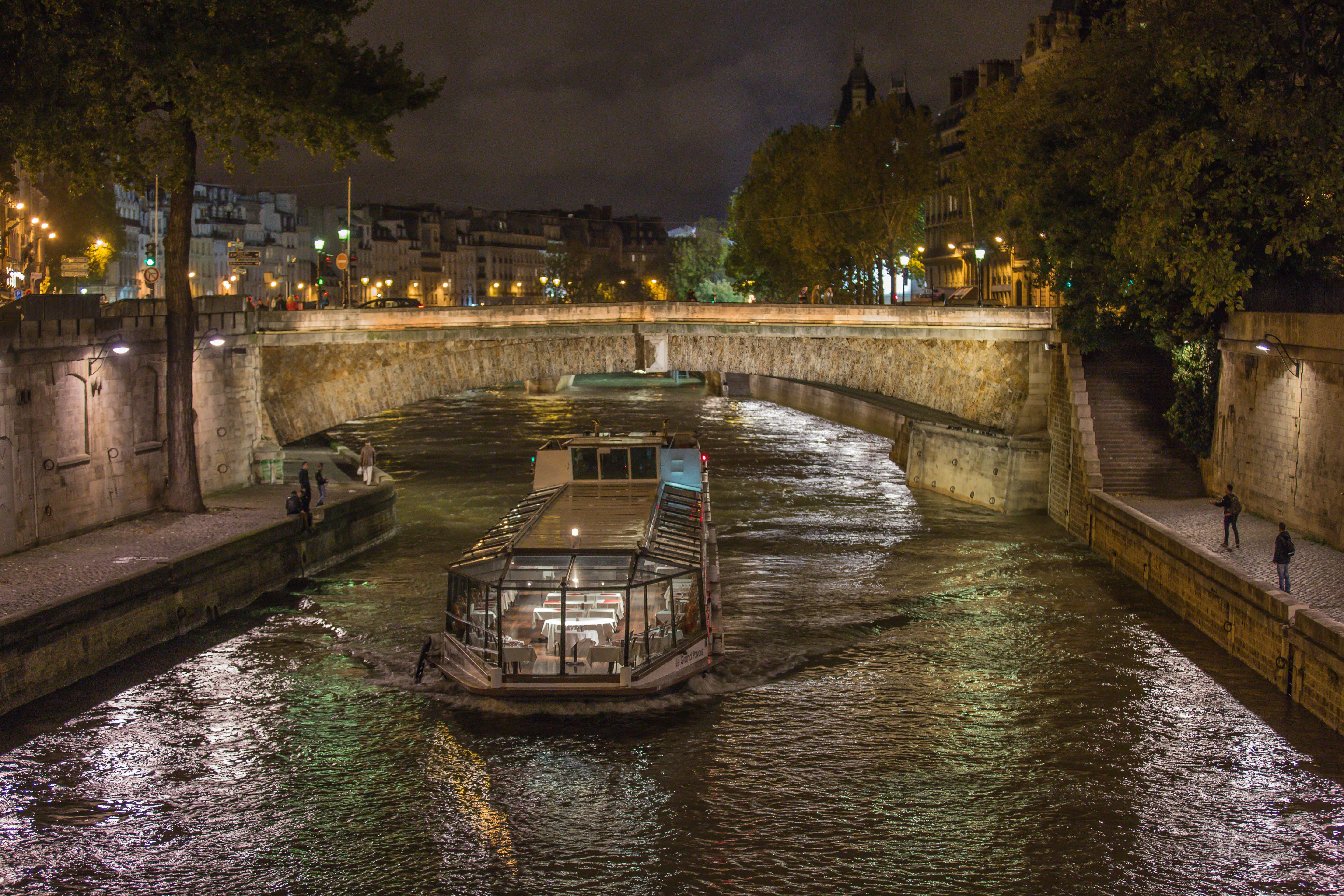 Petit-Pont - Cardinal Lustiger, Paris, 6 novembre 2013